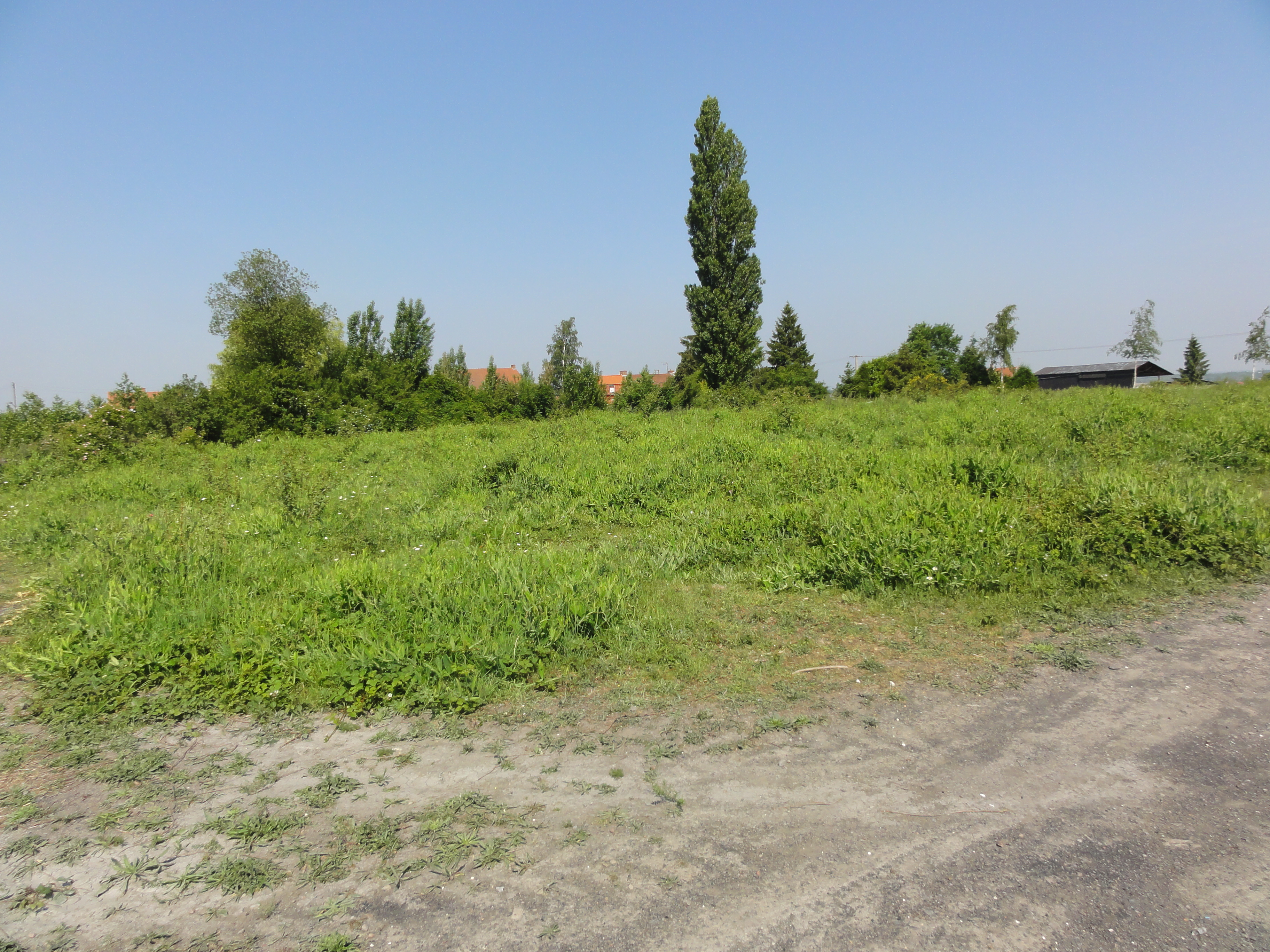 Terril n° 135 dit Sébastopol, Fosse Sébastopol de la Compagnie des mines d'Aniche, Erchin, Nord, Nord-Pas-de-Calais, France.